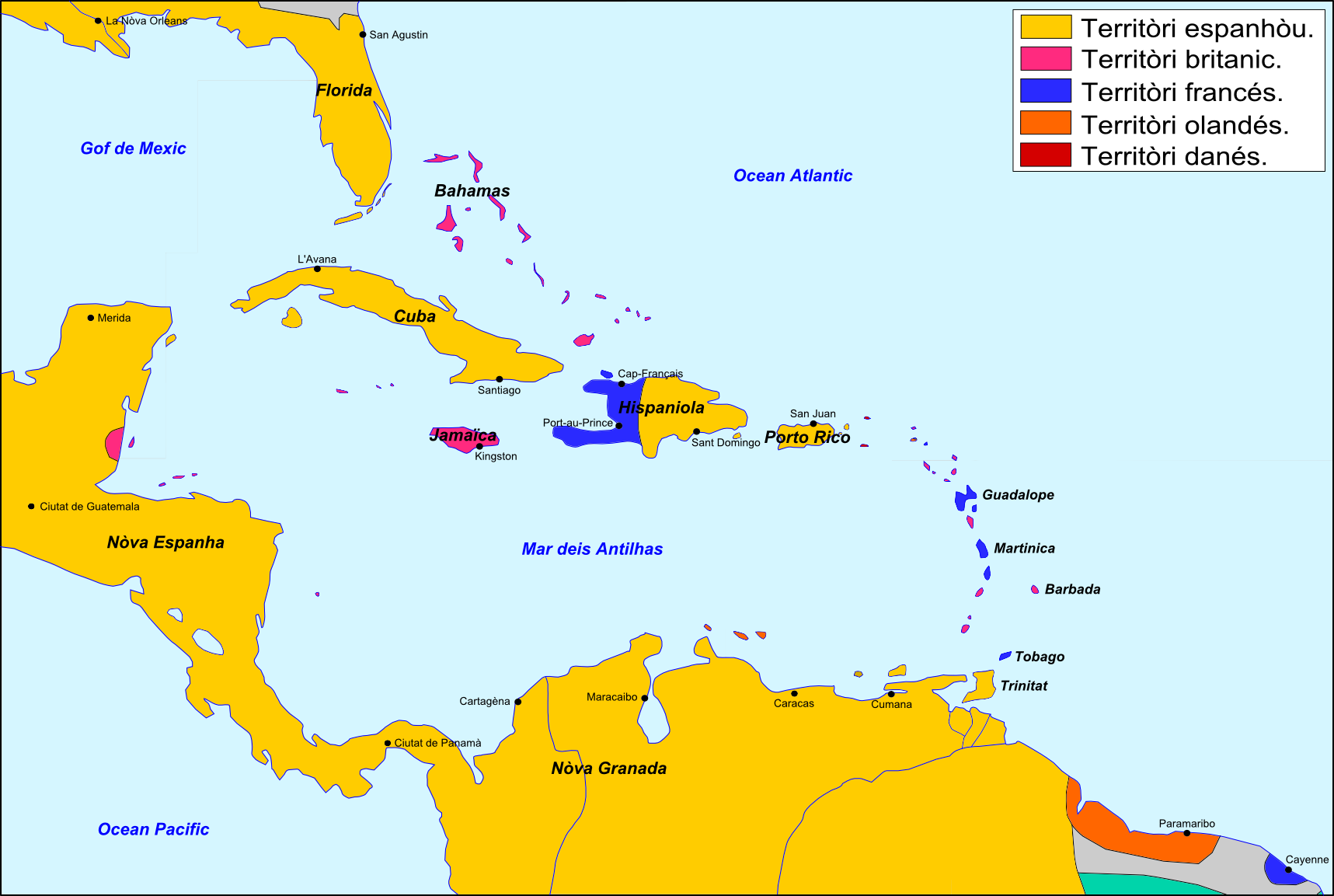 Antilhas vèrs 1790.